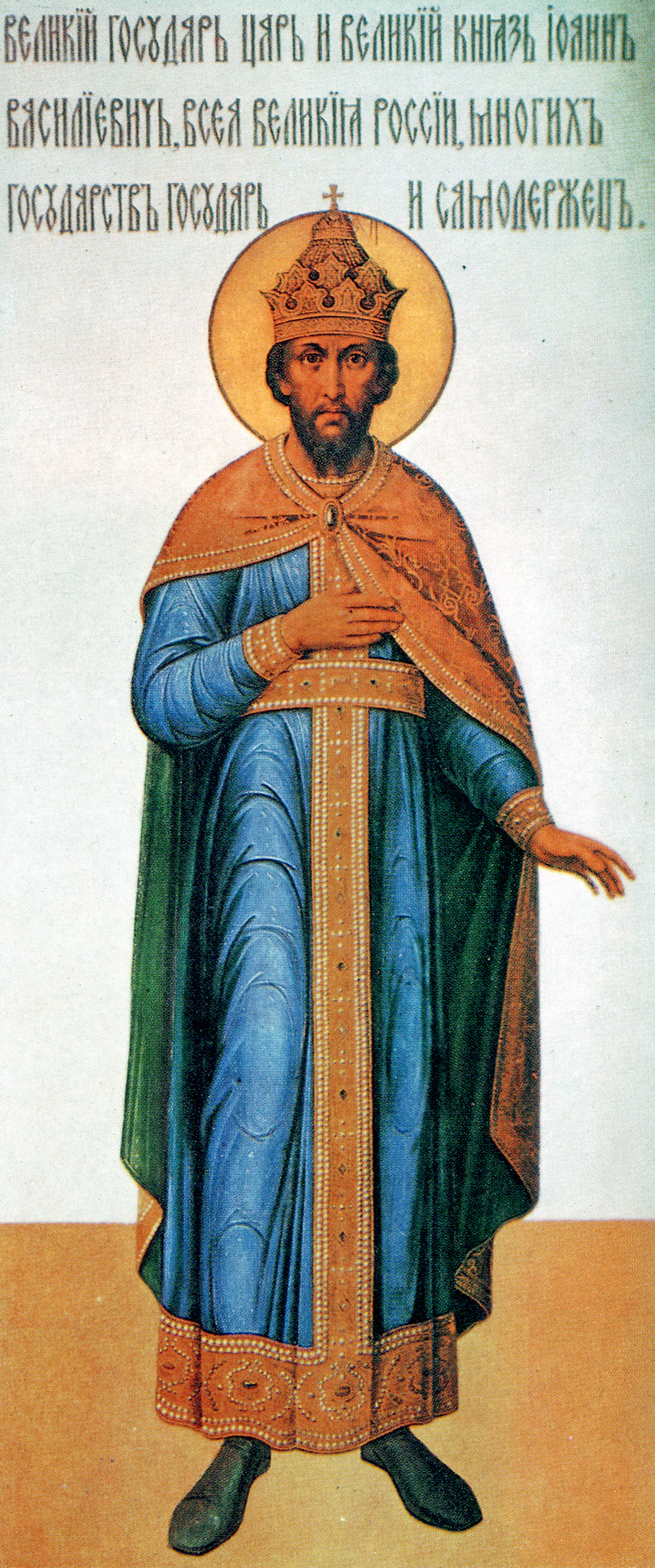 Царь Иван IV Роспись Грановитой палаты. Фрагмент. 1881-1882.